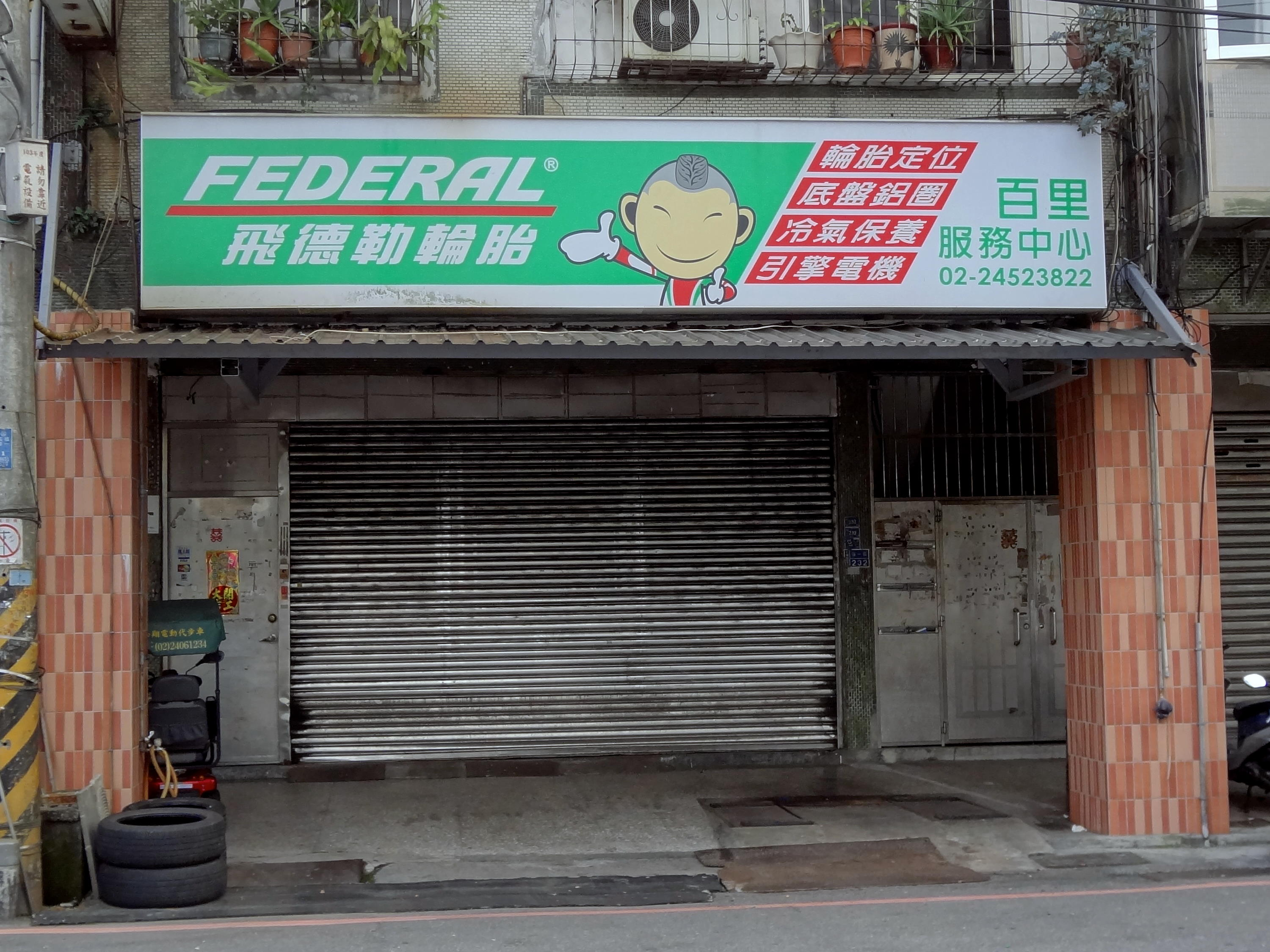 百里輪胎行，位於基隆市七堵區福一街232號1樓，上方掛飛德勒輪胎廣告燈箱。